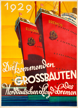 Norddeutscher Lloyd Bremen - Die kommenden Grossbauten, 1929